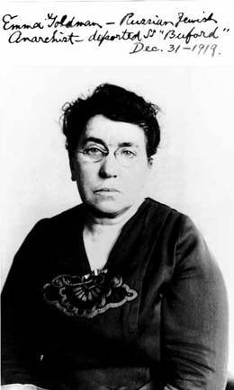 Emma Goldman - 31 décembre 1919 - identité judiciaire (?)